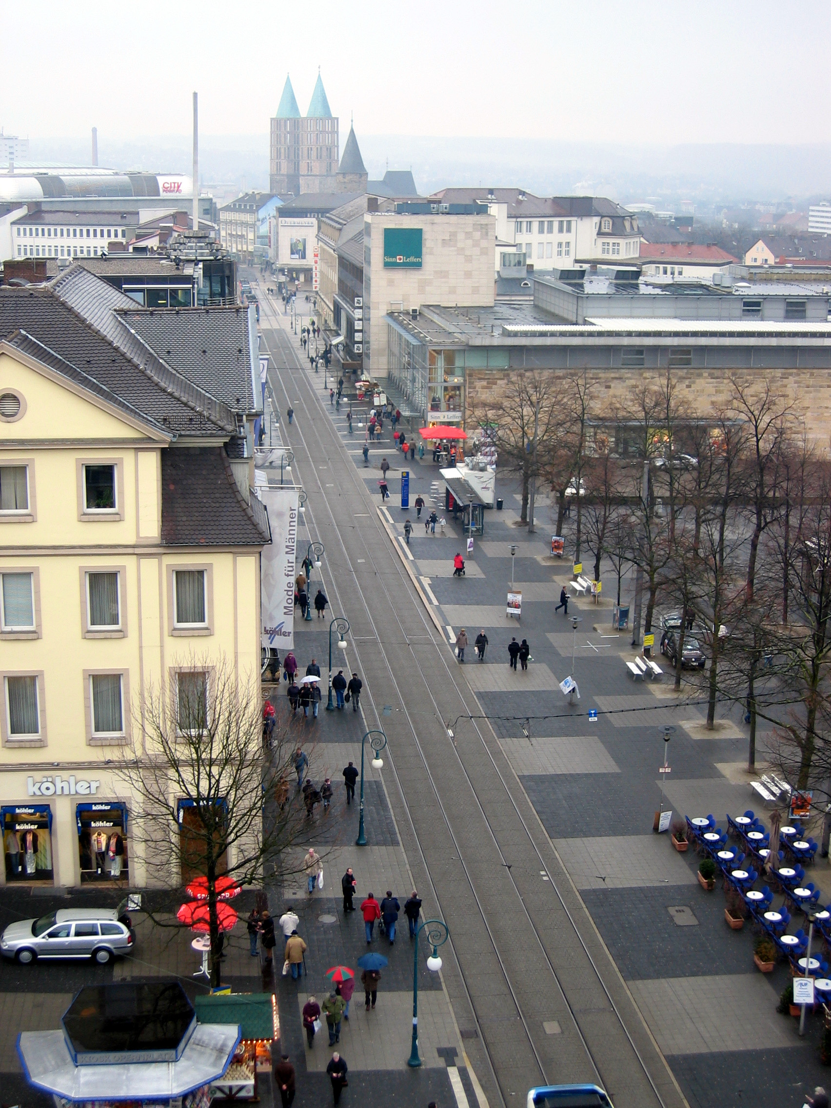 Kassel, Blick auf die Obere Königsstraße